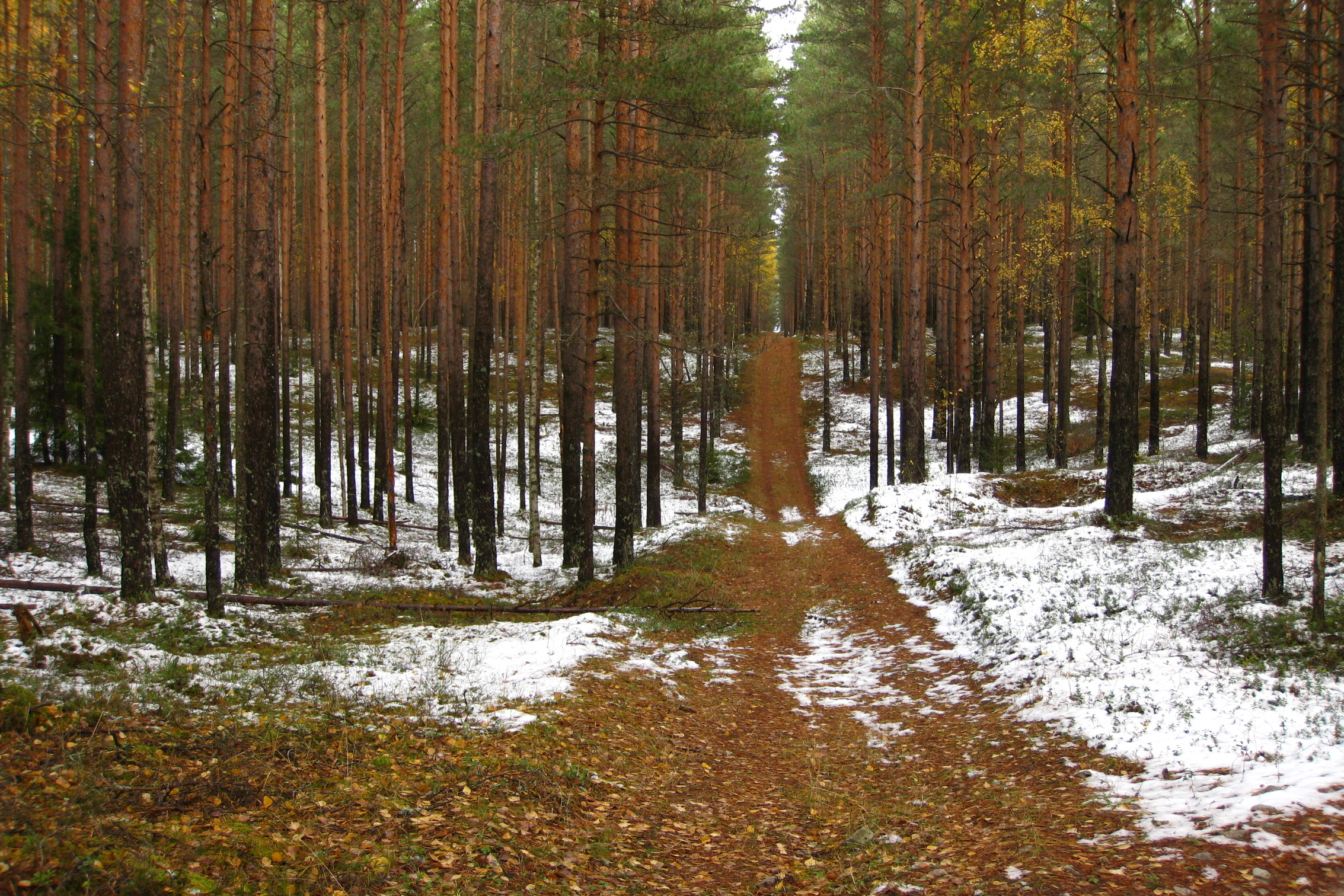 Kurtna mõhnastik Ahnejärvest Kirdes, Kurtna MKA